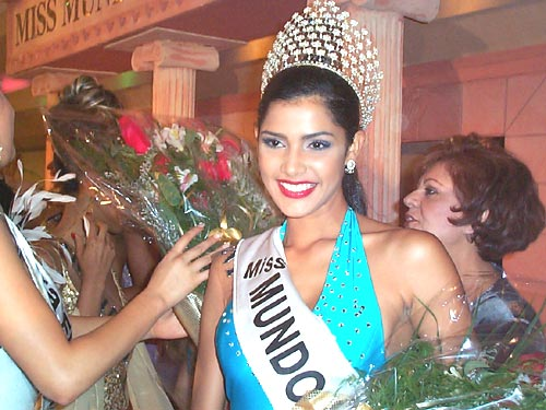 Marianela Lacayo recibiendo la Corona que la acreditaba como Miss Mundo Latino Internacional 2002